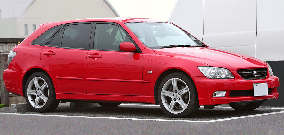 Toyota Altezza Gita AS200 Z Edition ( GXE10W )